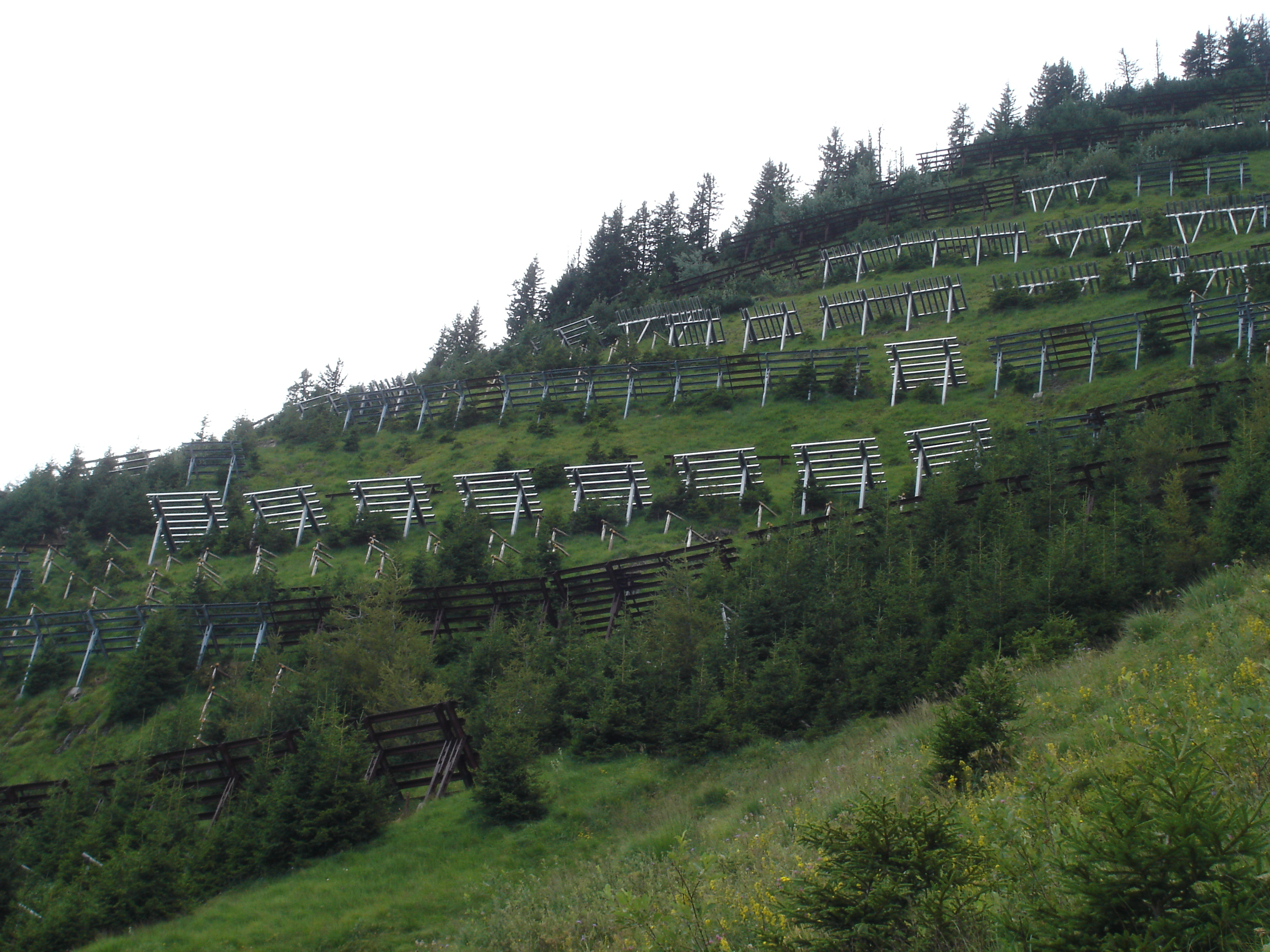 Verbauungen Tanngrindel